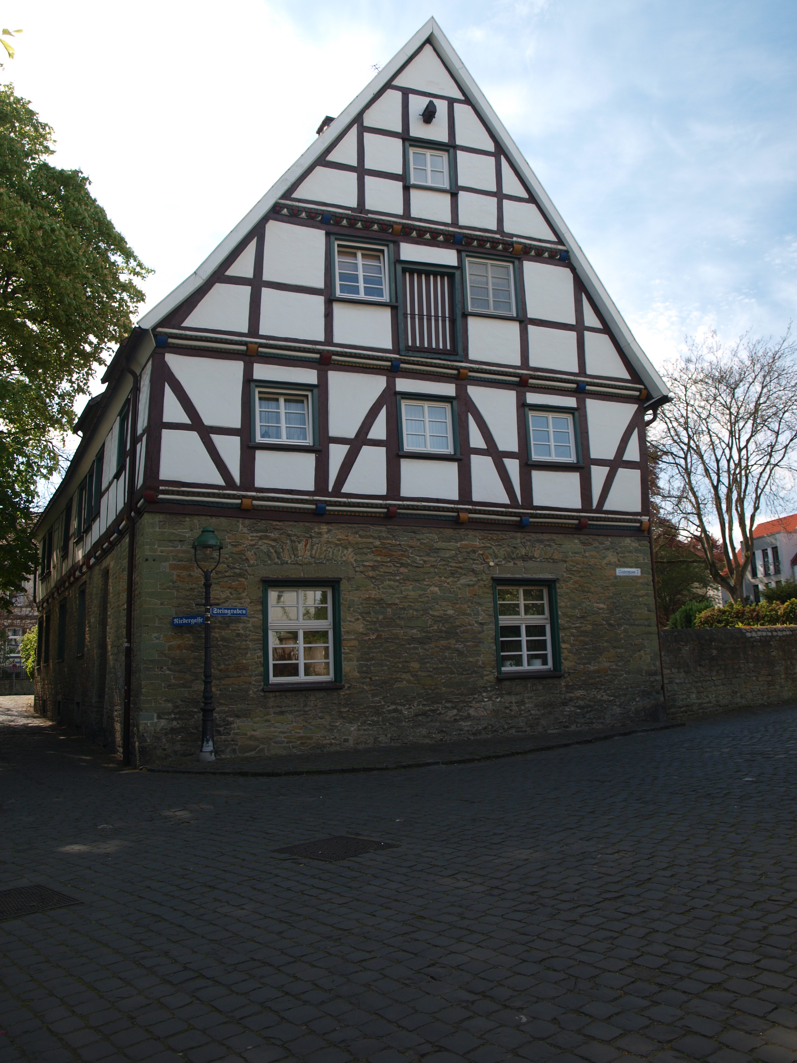 Stolpersteinlage Soest Niedergasse 2